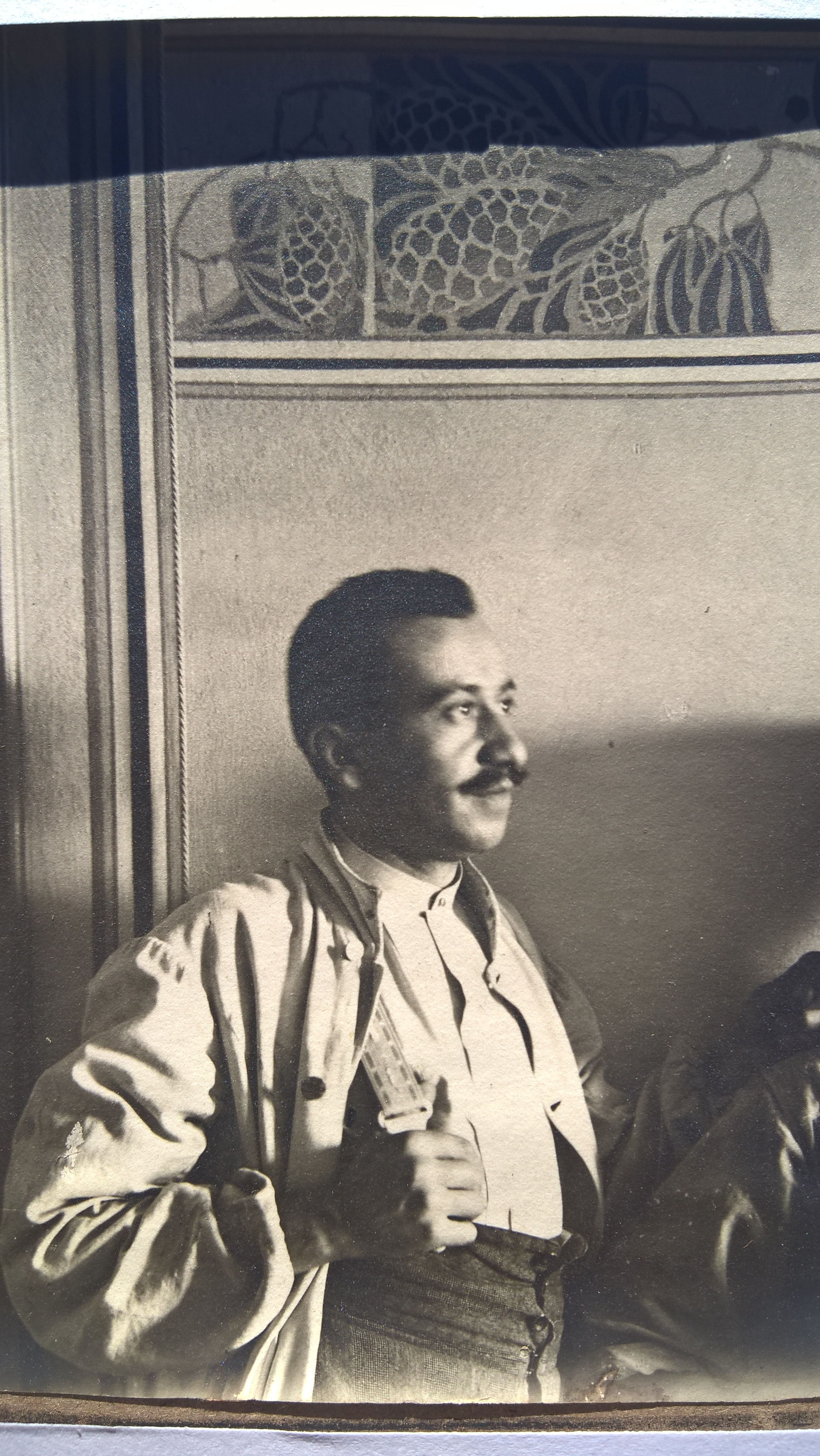 Fotografia del pittore Gino-Gian Mandrone nel 1915